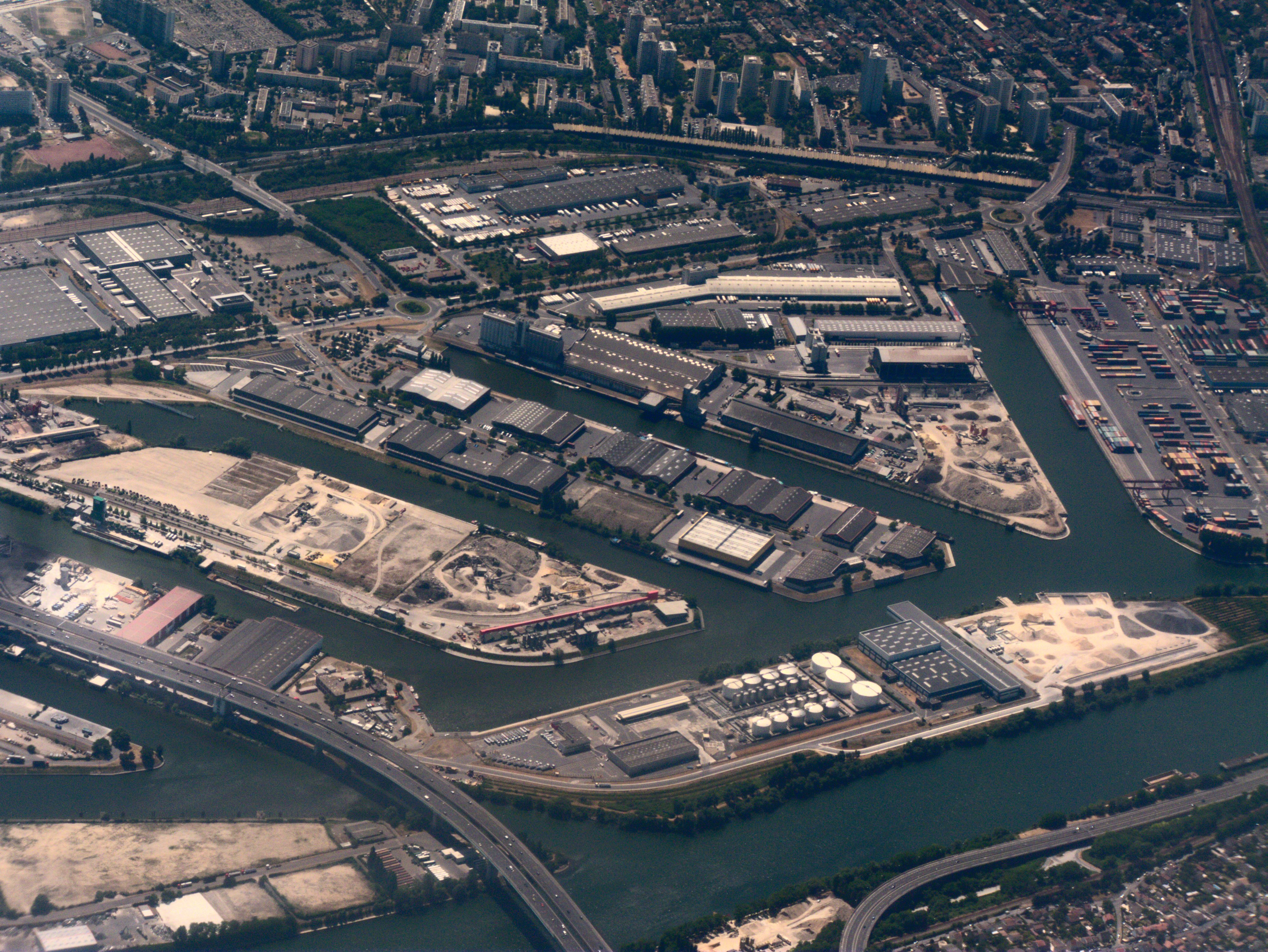 Port de Gennevilliers